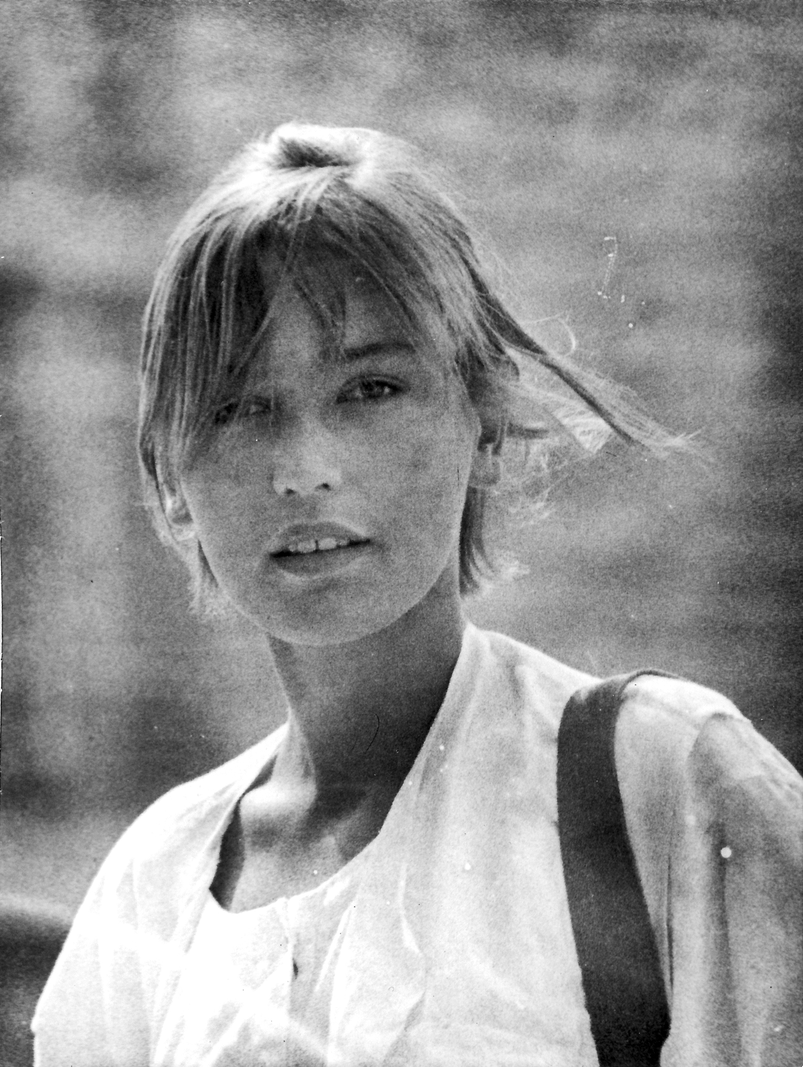 Hrvatska glumica Ana Marija Petričević na Filmskim susretima u Nišu 1984. godine